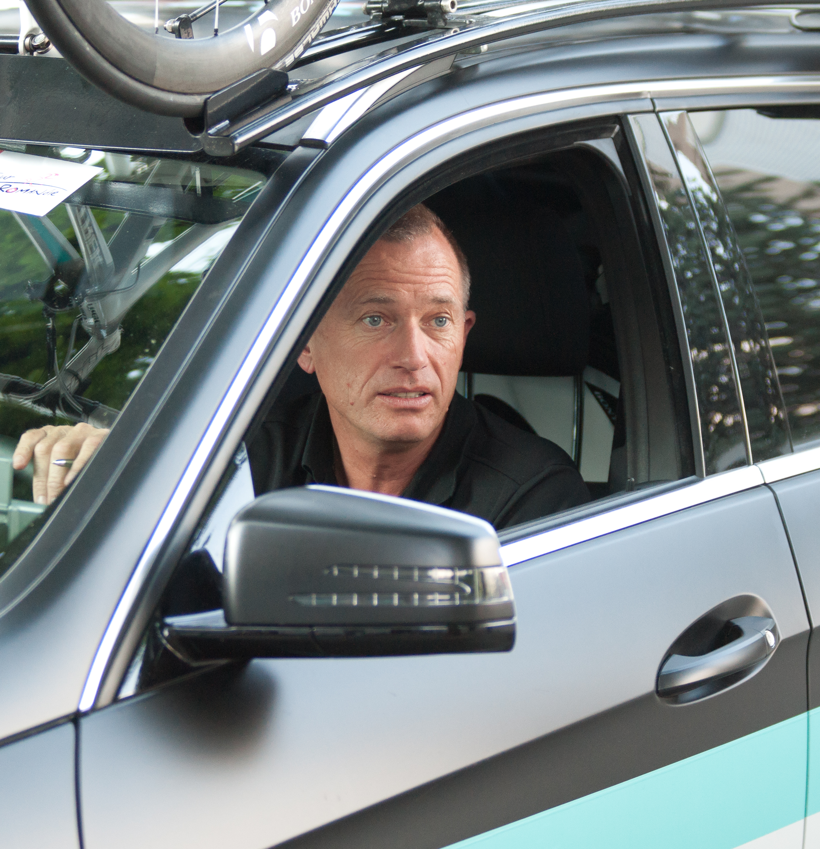 Contre la montre - Romandie 2010